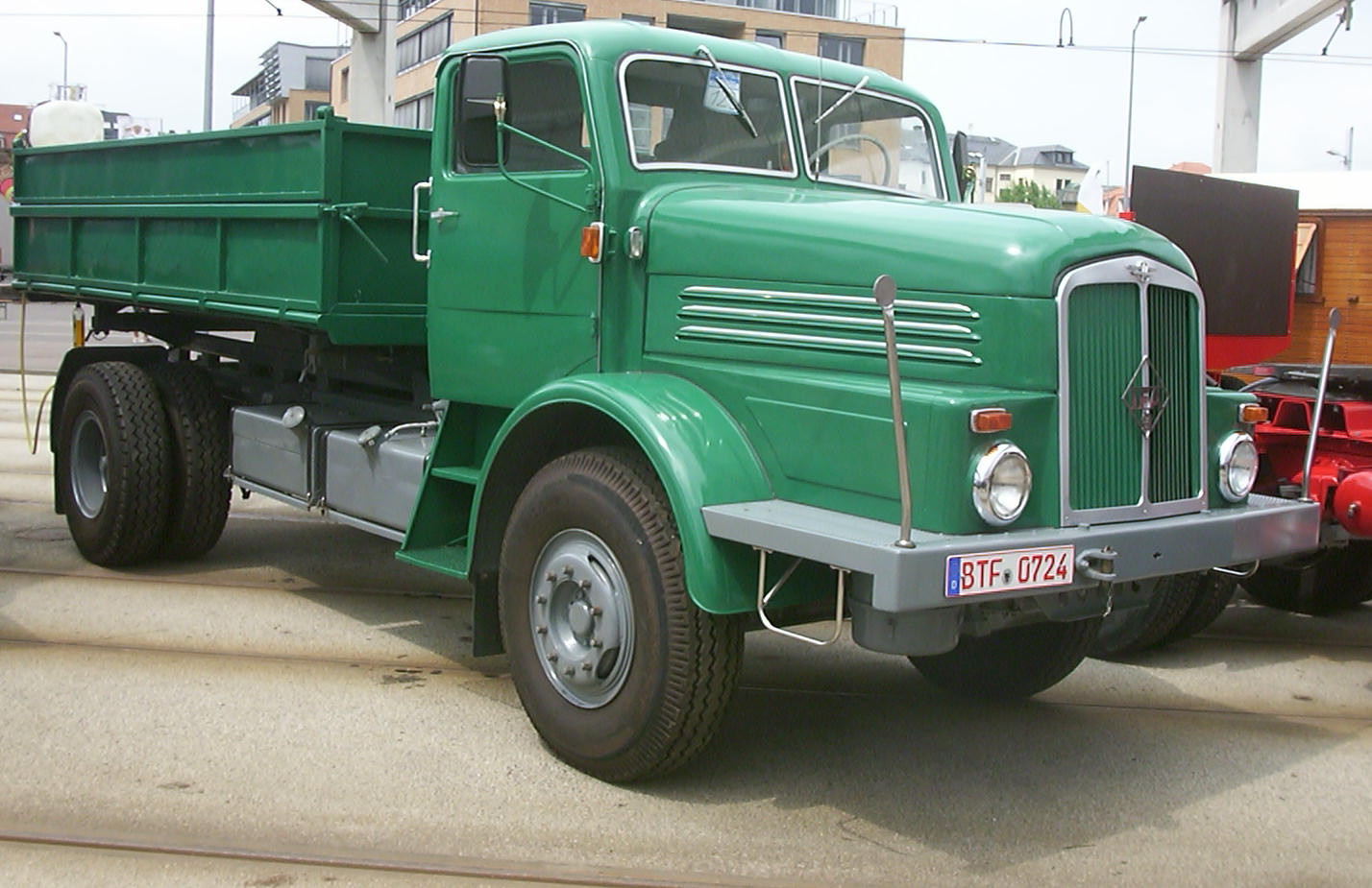 IFA H6 Kipper